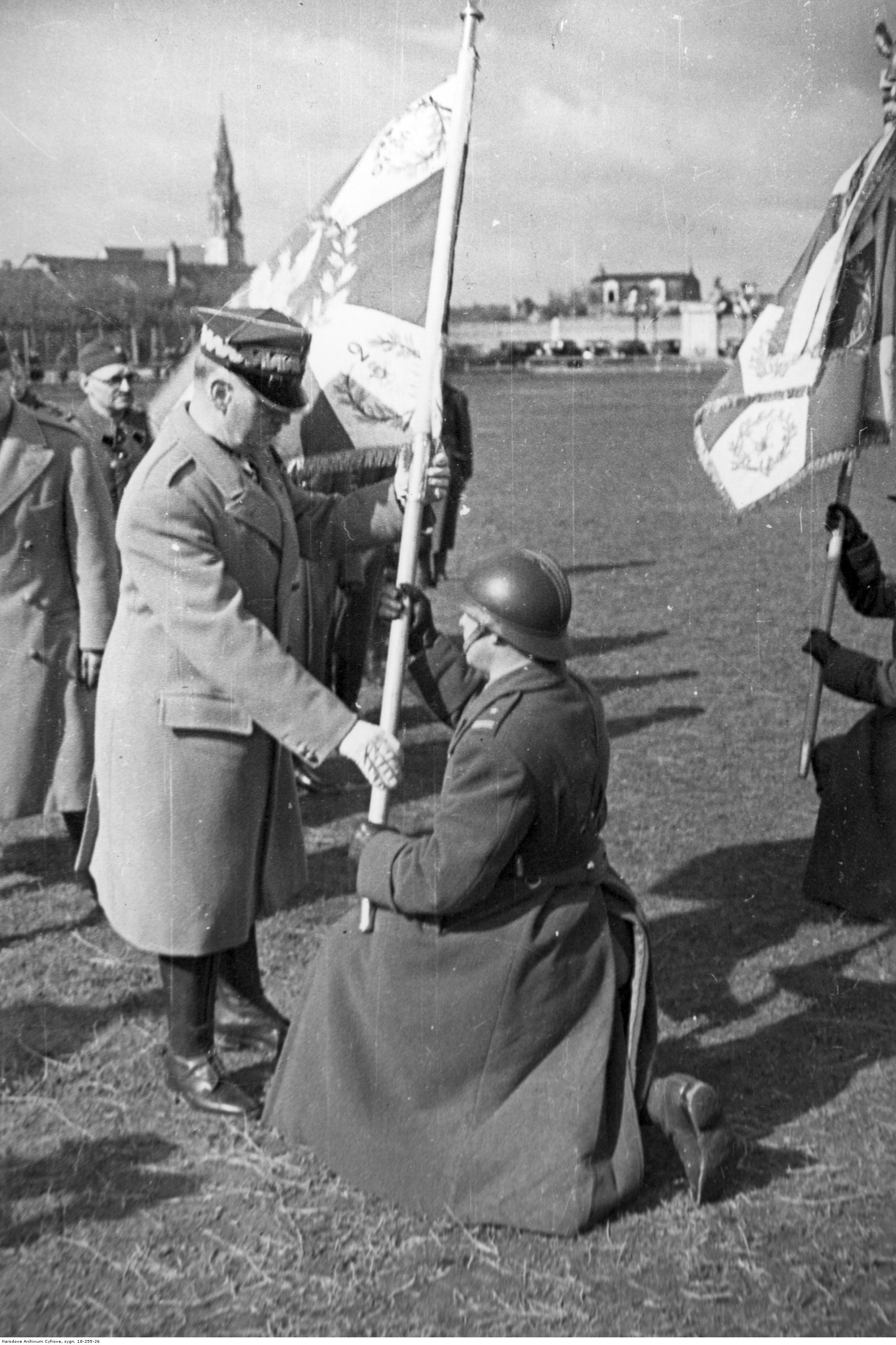 Uroczystość wręczenia sztandarów oddziałom saperów polskich we Francji; Angers, 30 marzec 1940 r. Gen. Władysław Sikorski wręcza sztandar; z lewej płk. dypl. Aleksander Kędzior. Archiwum Fotograficzne Czesława Datki. Sygnatura: 18-255-26